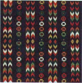 Гродзенскае ткацтва. Посцілка. Вёска Малая Воля Дзятлаўскага раёна Гродзенскай вобл.